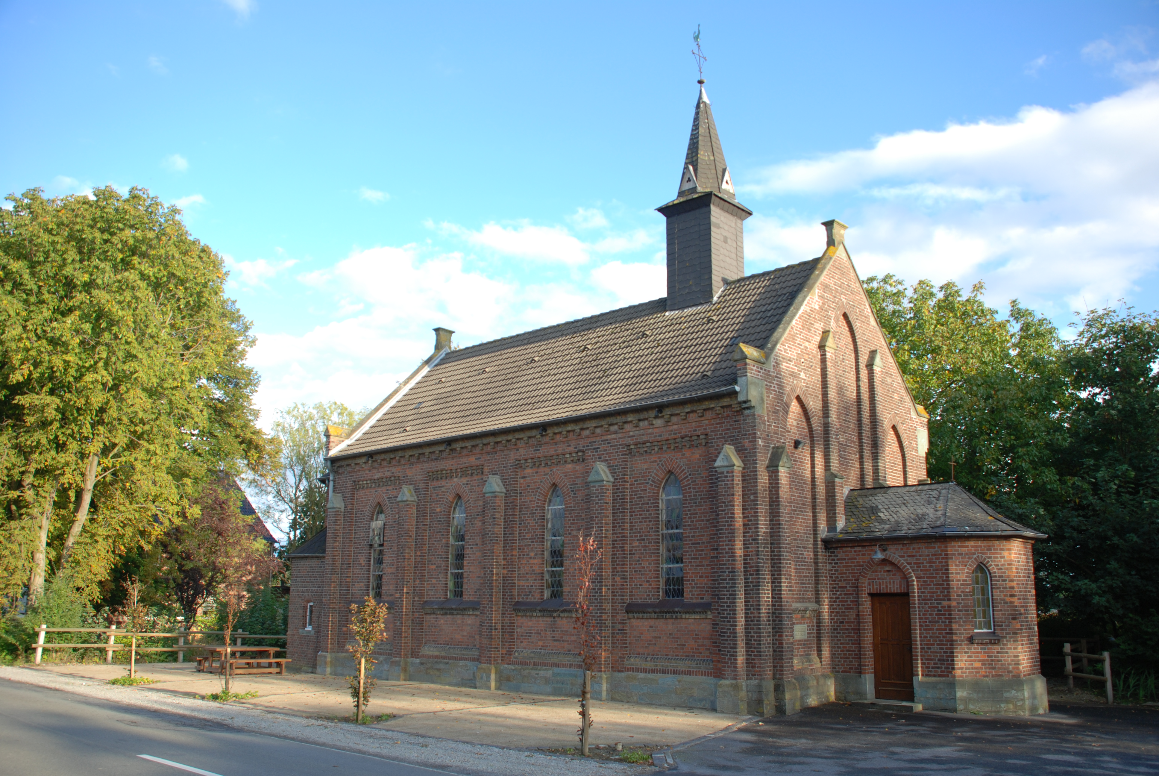 Die katholische ST. ANTONIUSKAPELLE ZU RASSENHÖVEL ist ein denkmalgeschütztes Kirchengebäude in der Rassenhöveler Straße 3 in Herzfeld, einem Dorf in der Gemeinde Lippetal im Kreis Soest (Nordrhein-Westfalen).This is a photograph of an architectural monument., no. 0